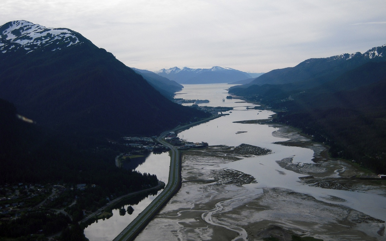 Juneau Alaska, Douglas Island on right. Looks like low tide.